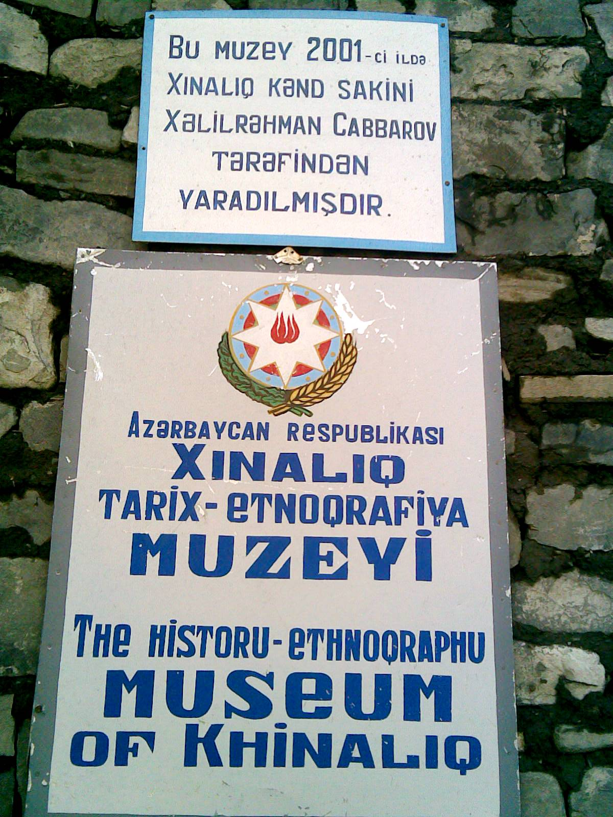 Xınalıq tarix-etnoqrafiya muzeyinin girişindəki lövhələr